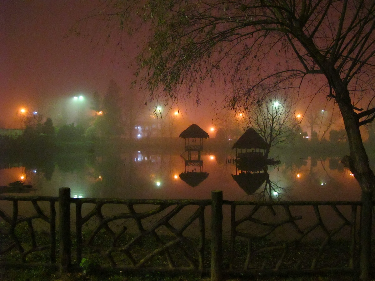 Mellat park at night